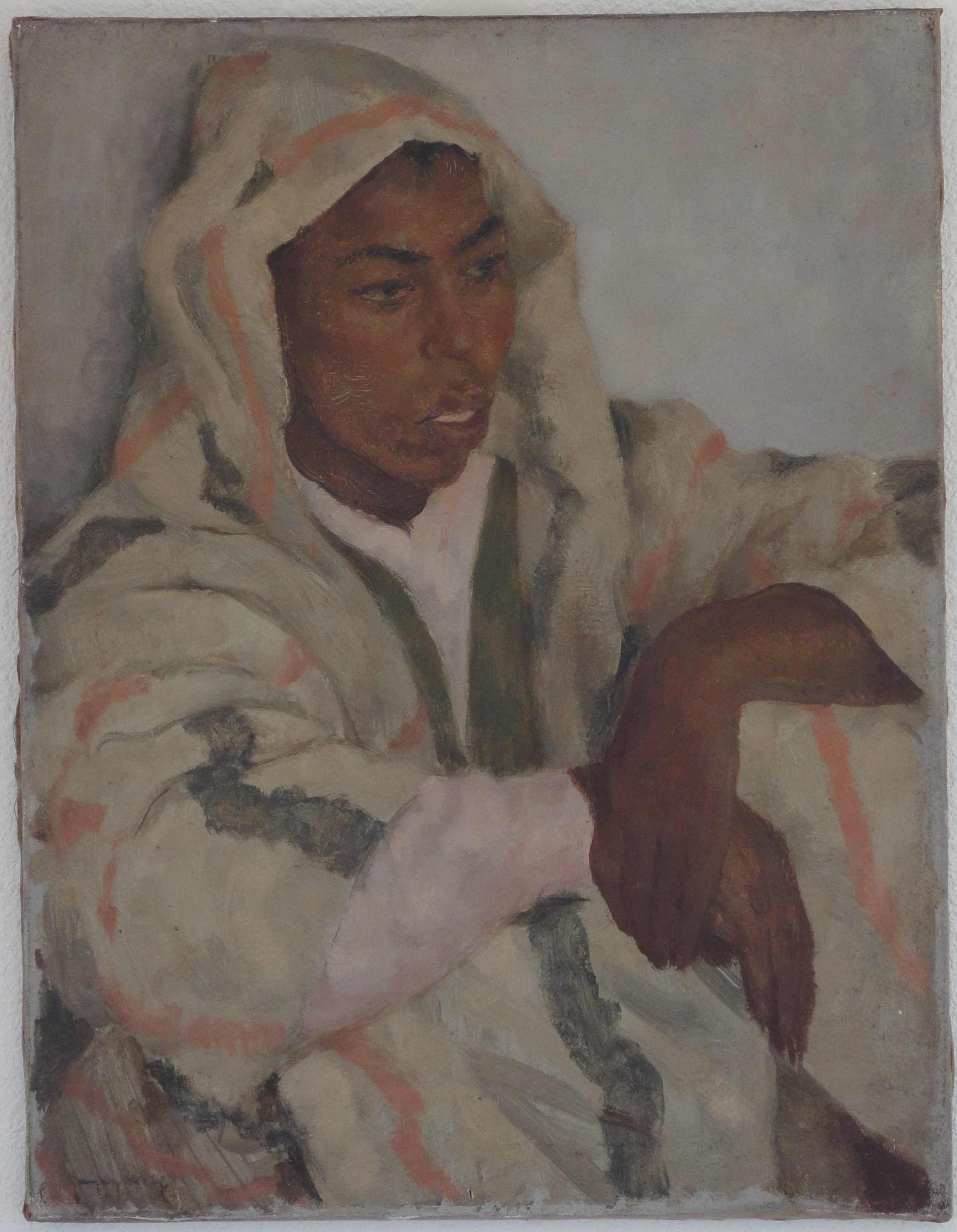 peint en Algérie